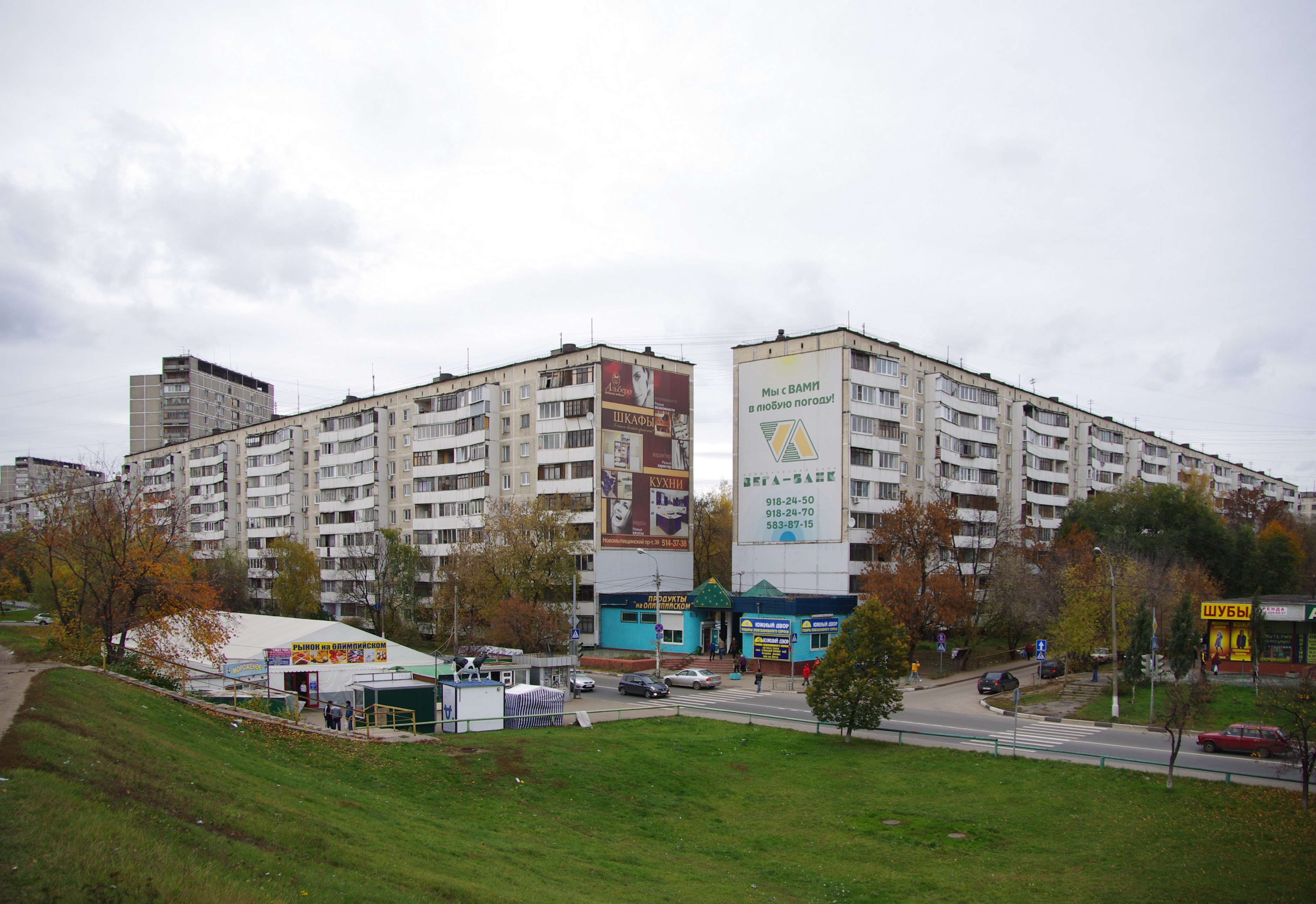 Вид на дома №24 и №2 (корпус 1) по Олимпийскому проспекту в Мытищах.